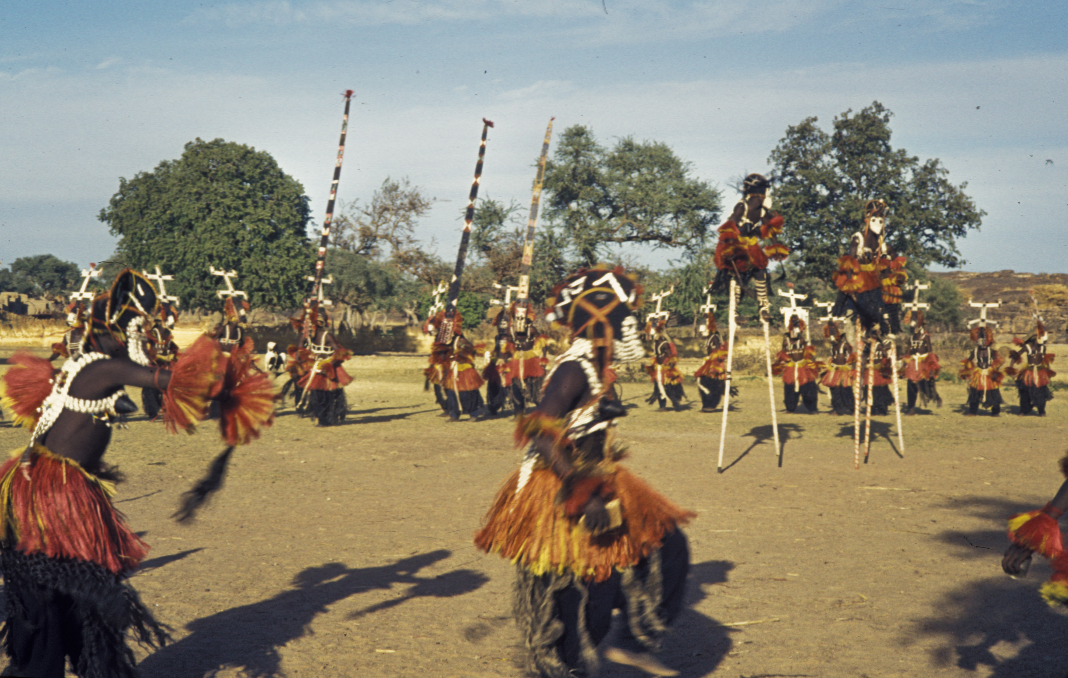 Mali